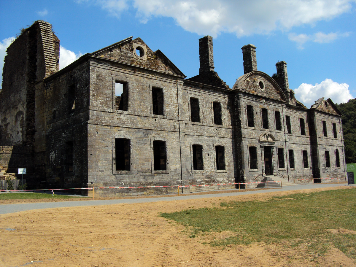 L'Abbaye Notre-Dame de Bon-Repos à Saint-Gelven en Côtes d'Armor (22) - France - Juillet 2011 - Photo 01Ænglisc: The Abbaye of Notre-Dame de Bon-Repos in Brittany, at Saint-Gelven in Côtes d'Armor (22) - France - July 2011- Photo 04